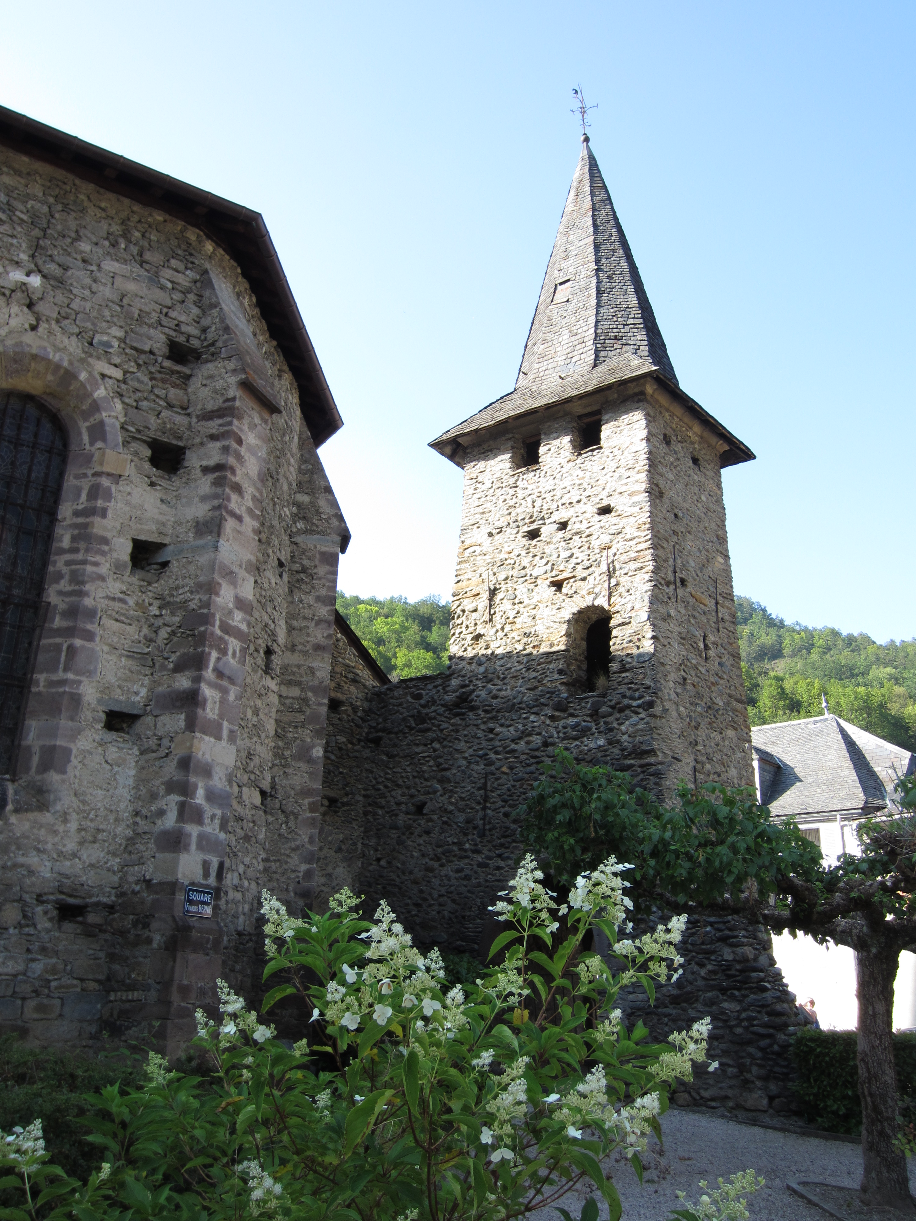 Église Notre-Dame de Sentein (Ariège, France). Une tour de l'ancienne enceinte.